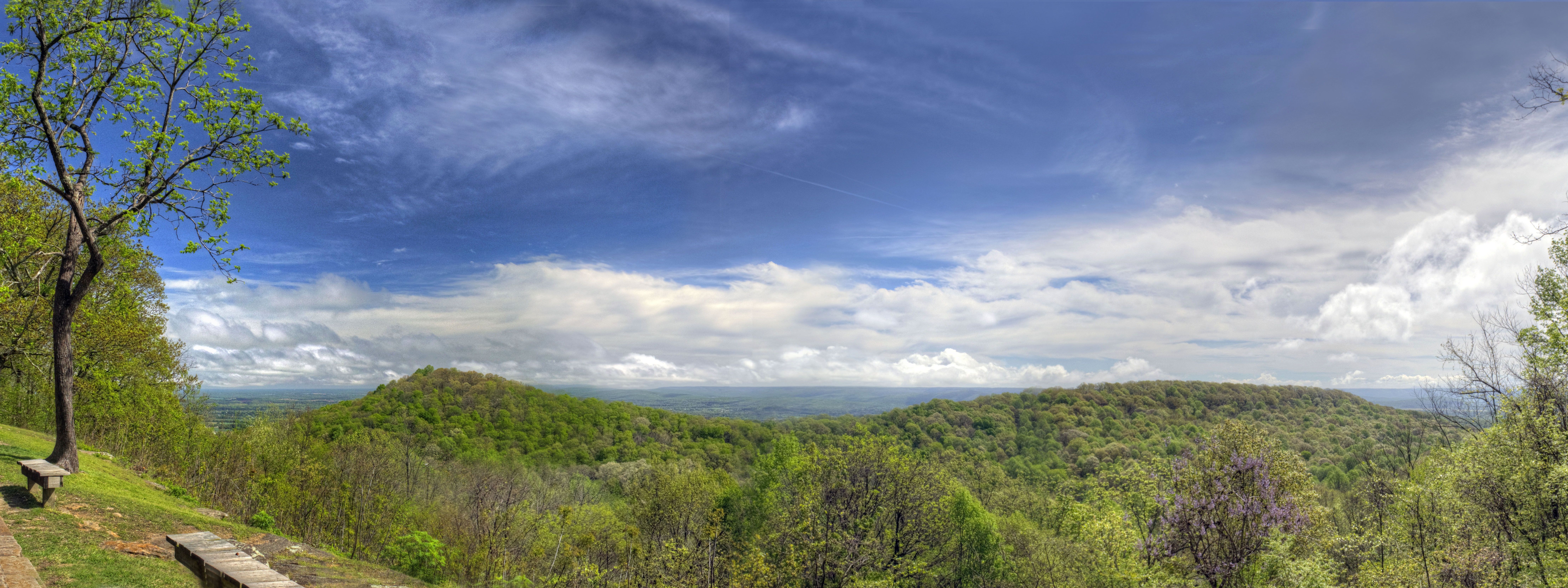 Monte Sano State Park Overlook - Springtime